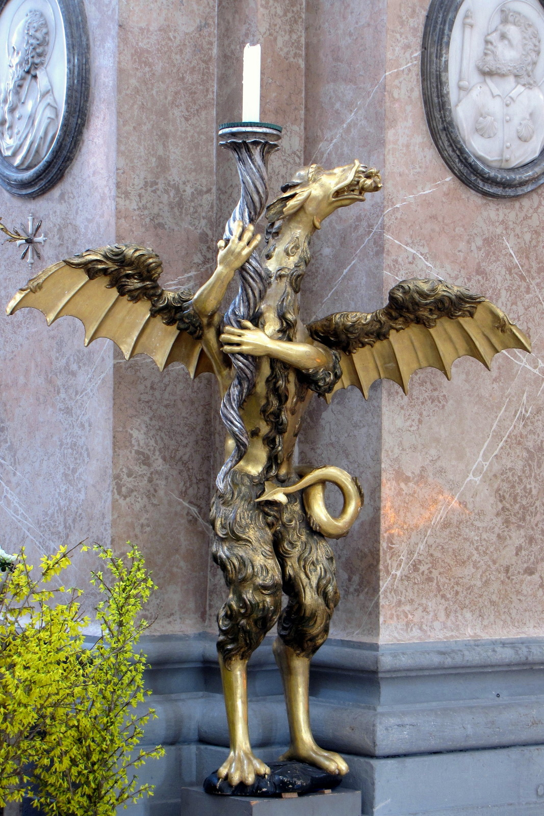 Drachenleuchter in der Stadtpfarrkirche St. Mang in Füssen von Thomas Seitz